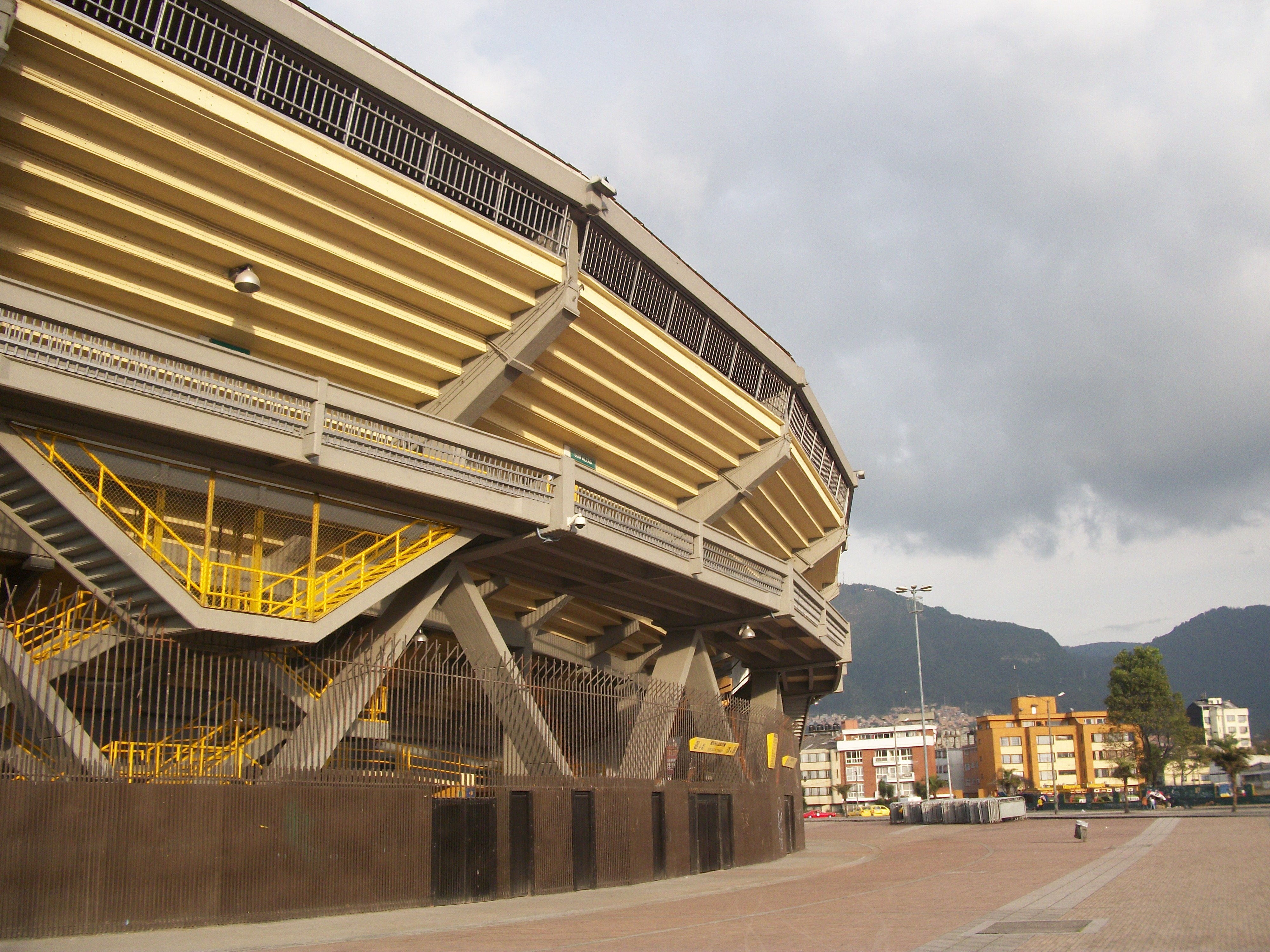 Estadio El Campín, costado suroccidental.